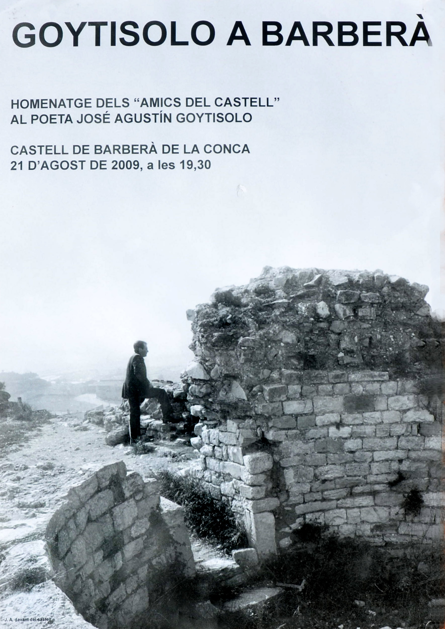 1999, Barberà ret homenatge al poeta José Agustín Goytisolo, mort aquell any.